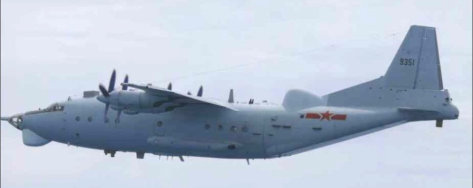 中文（台灣）: 中國解放軍空軍高新2號